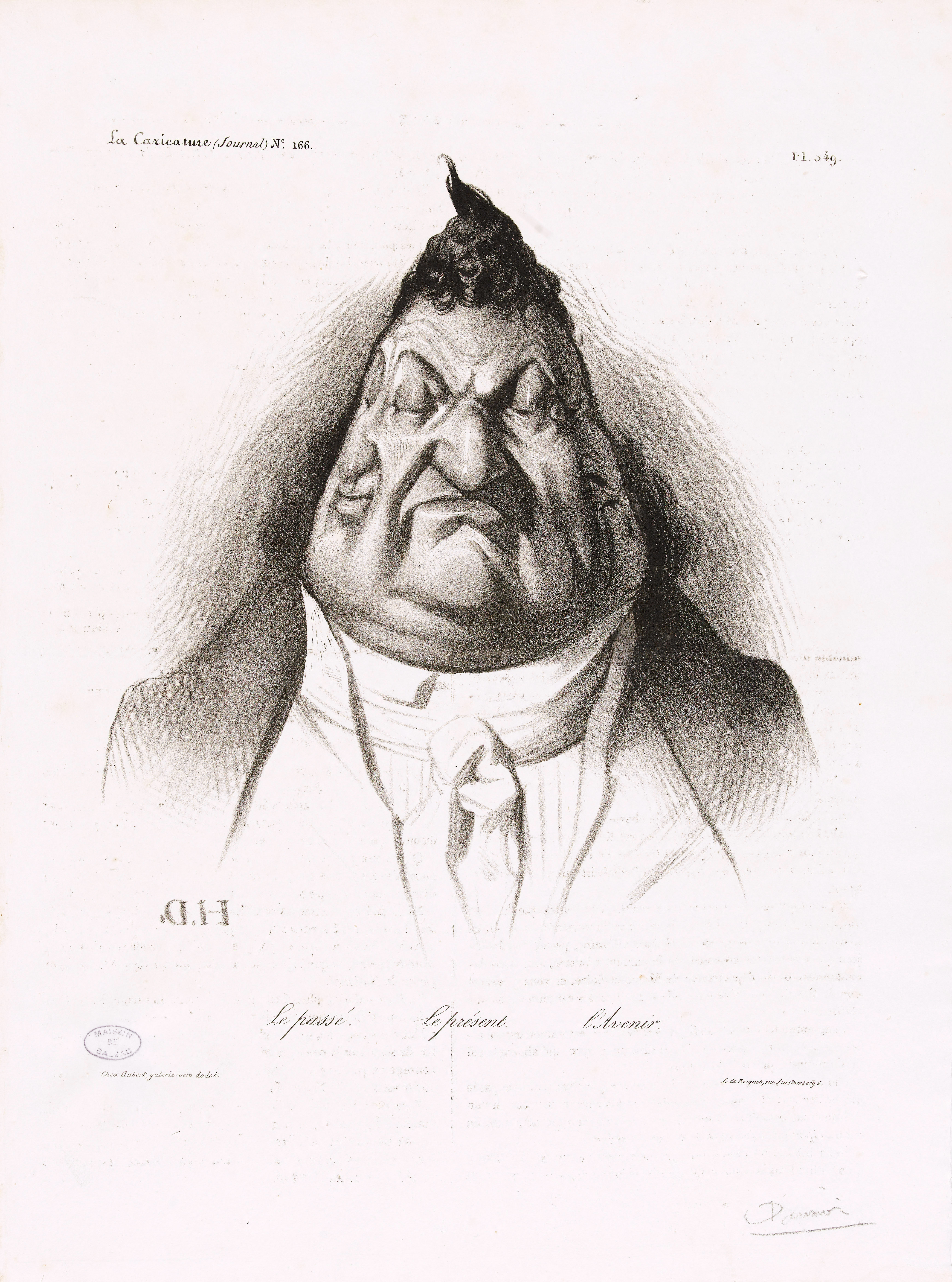 Le passé, le présent, l'Avenir (Louis Philippe d'Orlèans) lithographie, 19,6 x 21 cm, Coll. privée